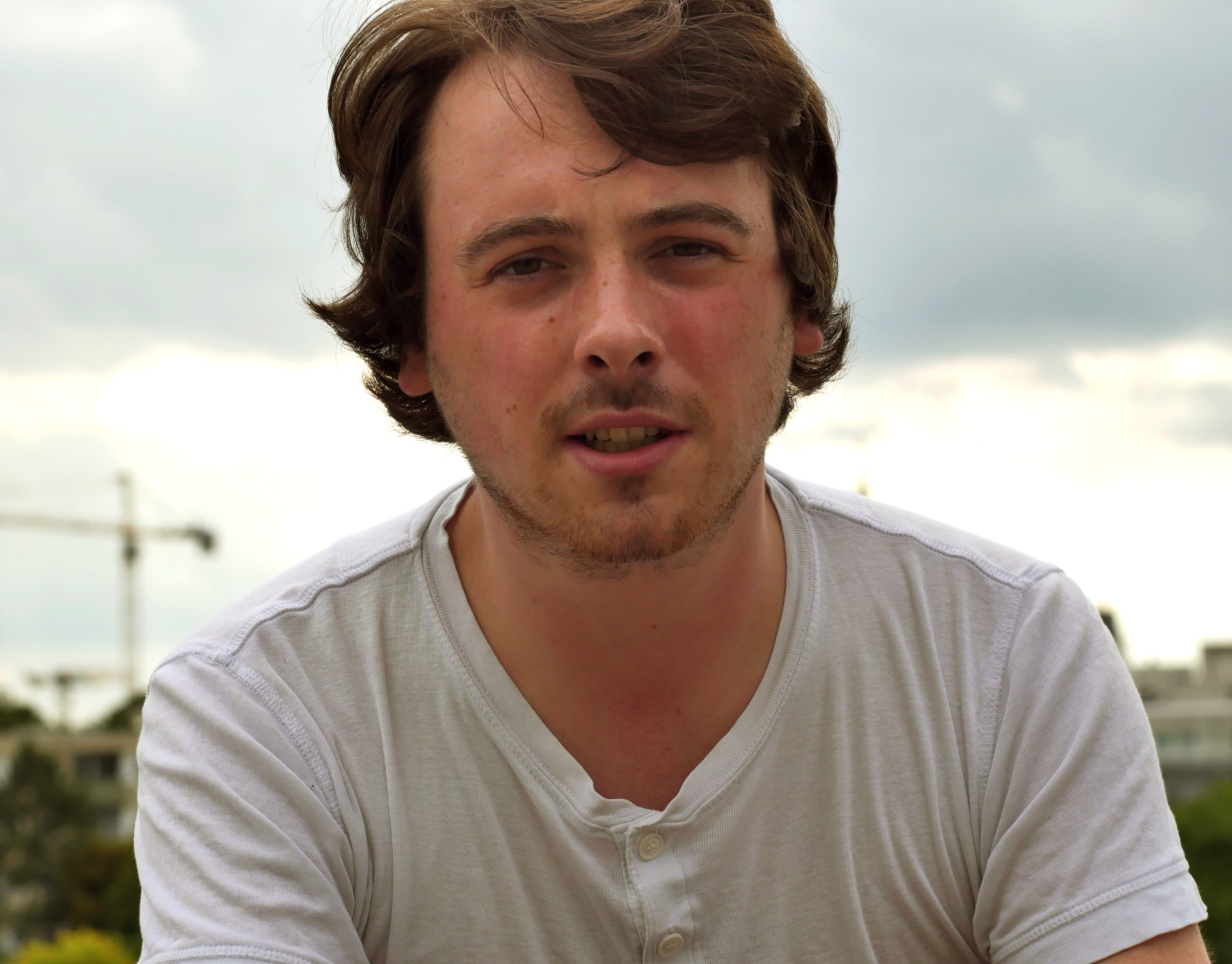 Ein Porträt von David Kühn